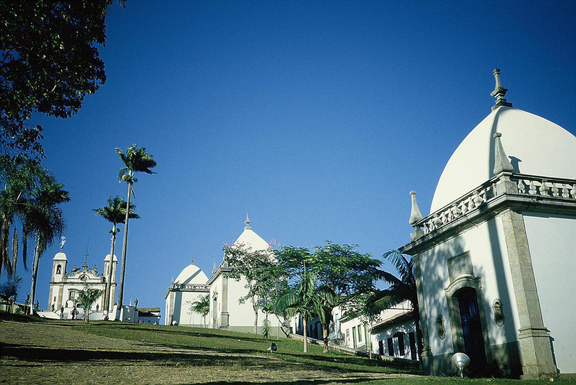 Congonhas, Minas Gerais, Brasilien